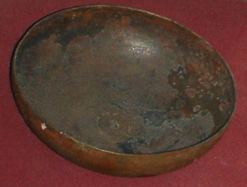 Own work based on image taken by gegman Erebuni museum, Yerevan, Armenia.